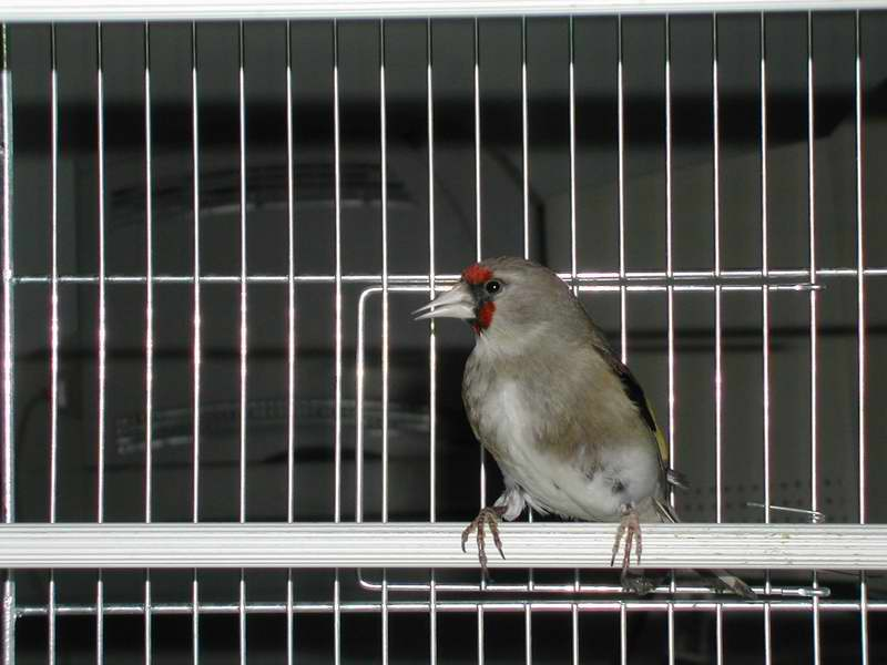 Carduelis carduelis, caniceps group female